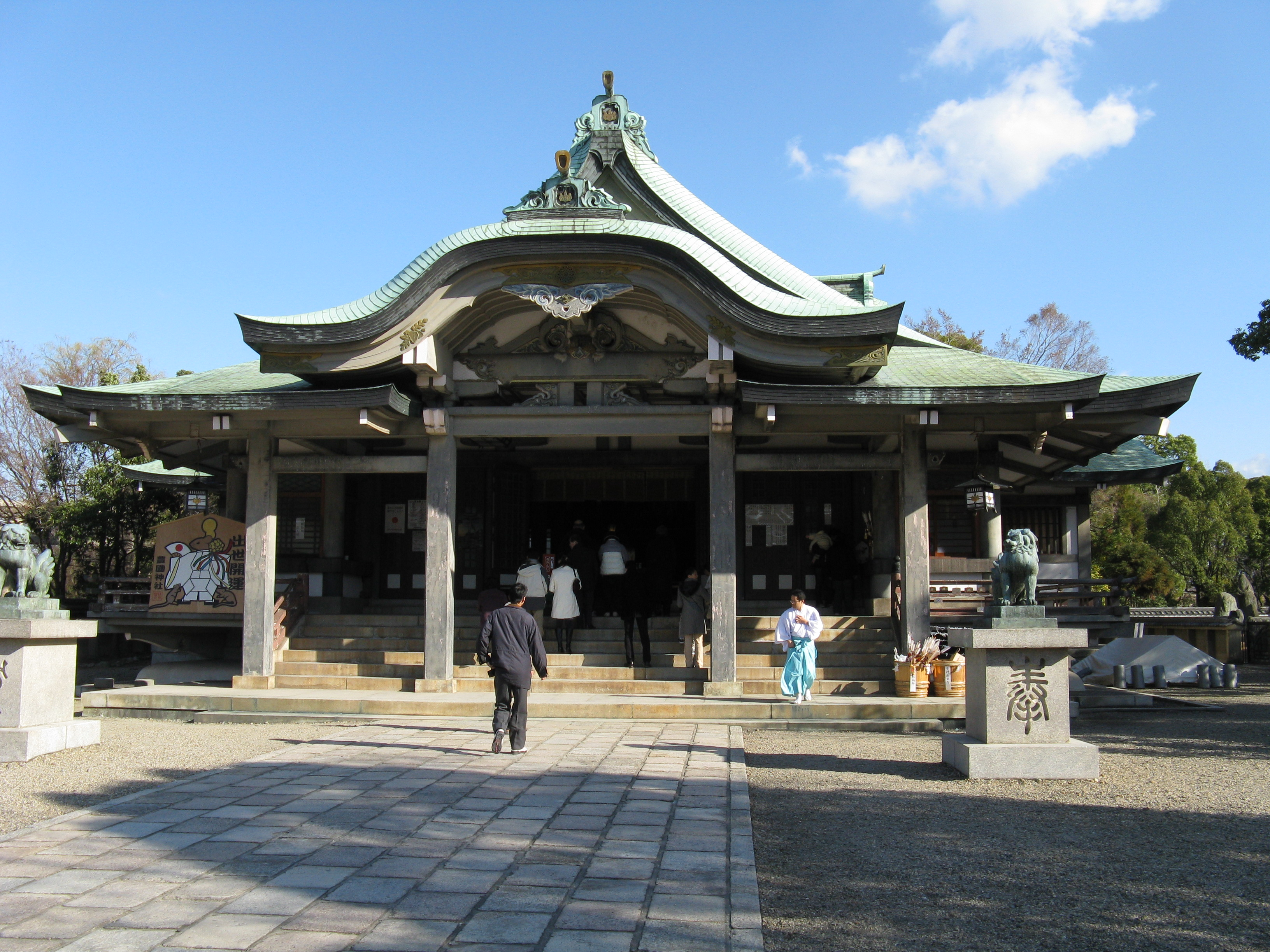 豐國神社